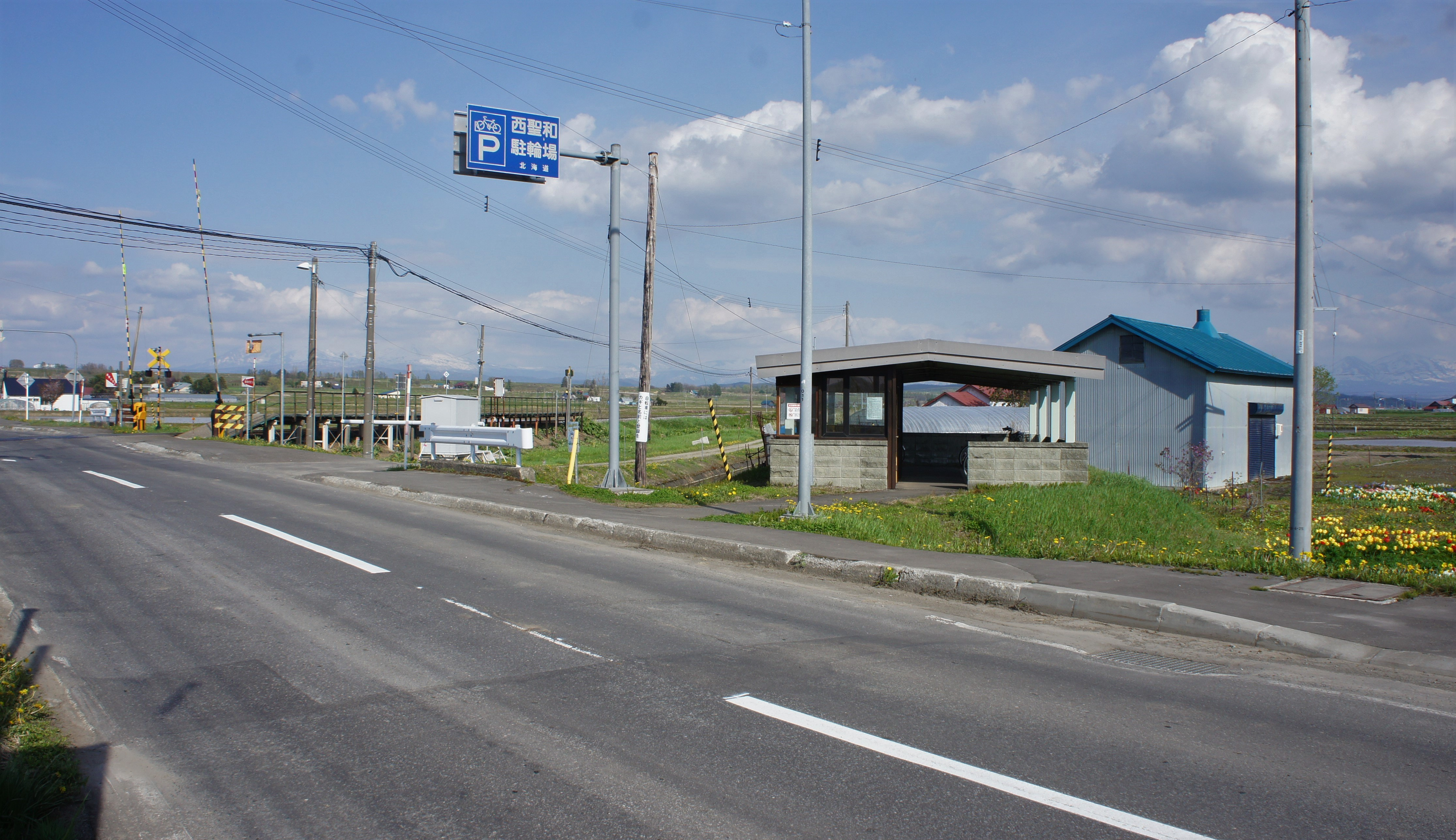 JR富良野線・西聖和駅全体